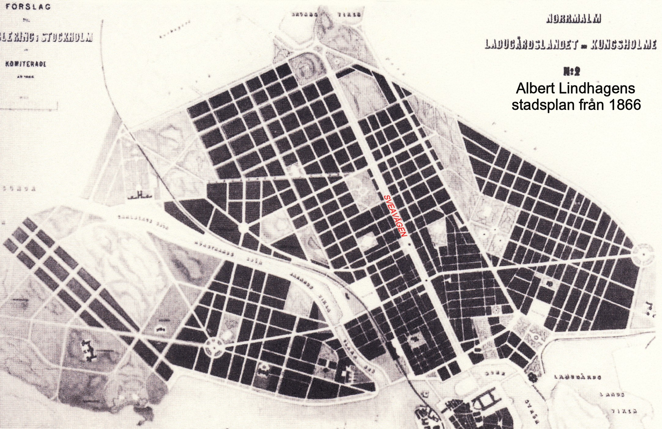 Albert Lindhagens stadsplan för Norrmalm och Kungsholmen i Stockholm från 1866.